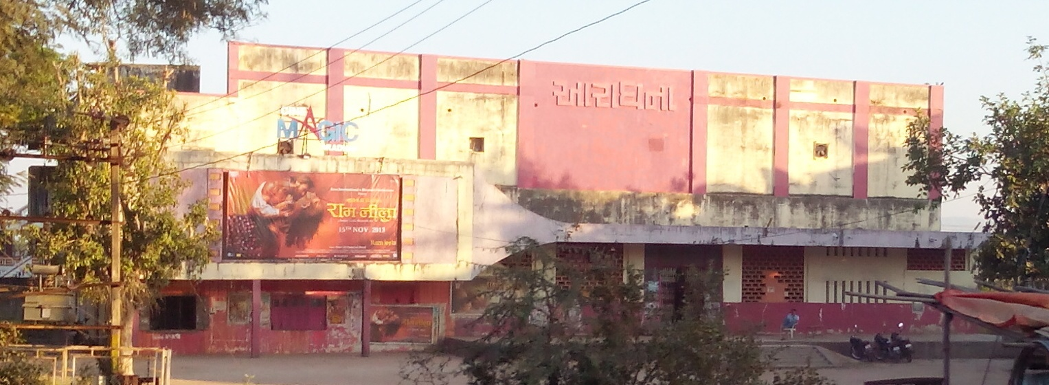 Aradhana cinema at Khedbrahma, Gujarat, India